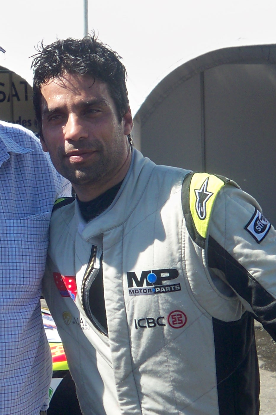 Martín Basso Paraná 2013